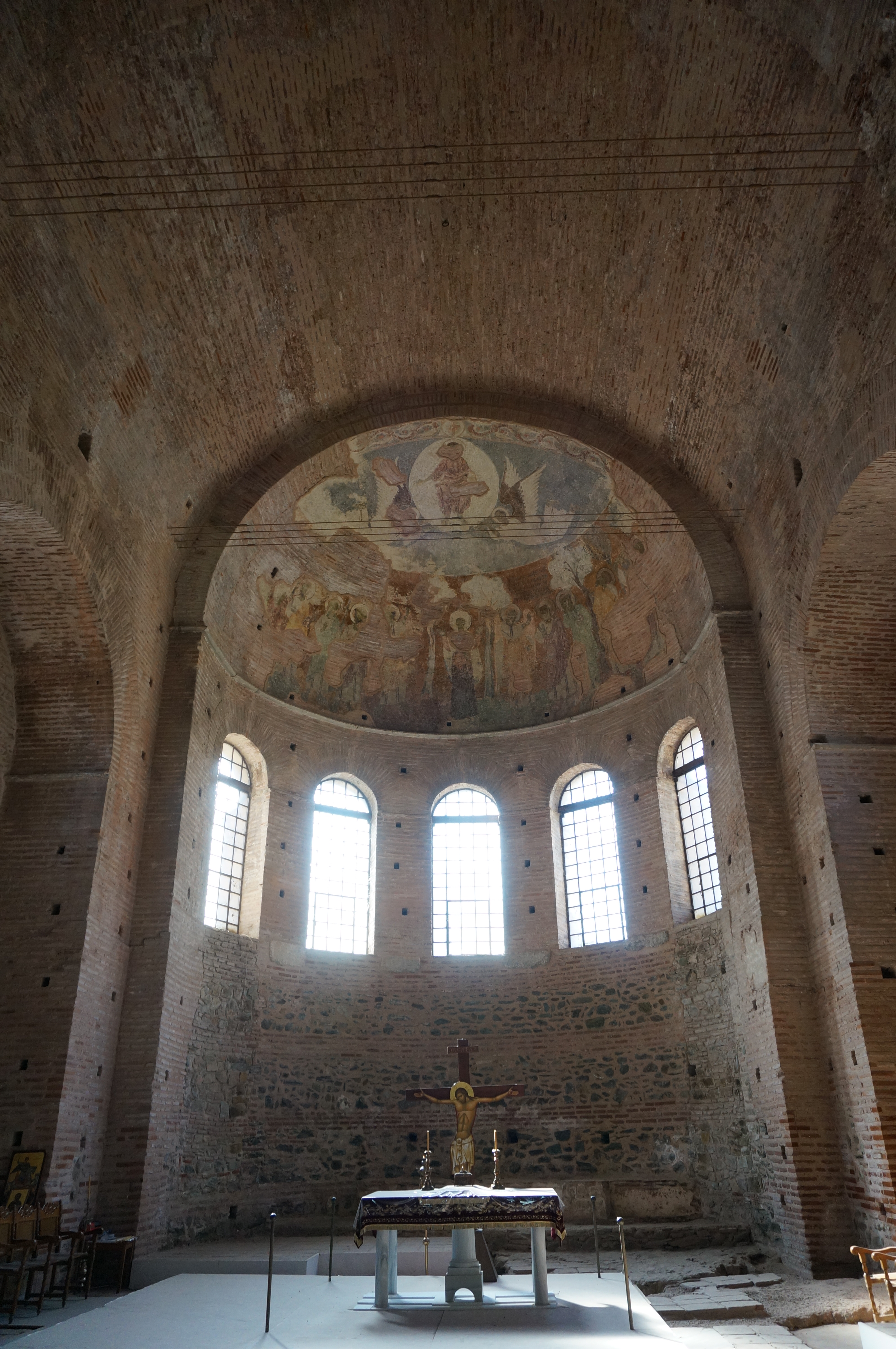 vue de la rotonde de st-georges.